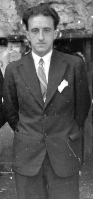 Xabier Lizardi idazlea 1933an.